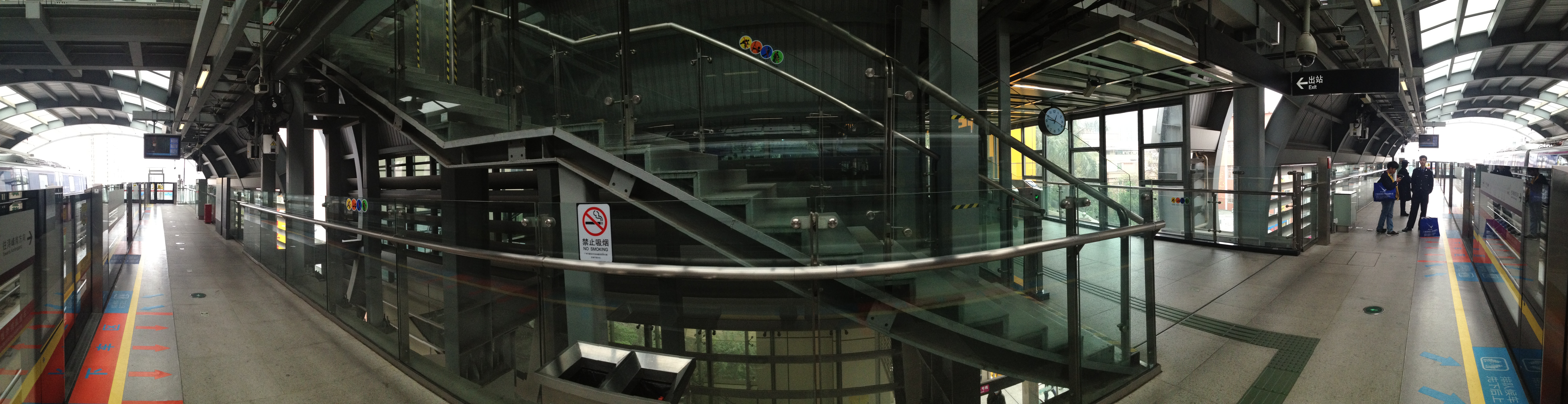 广州地铁横沙站月台全景图